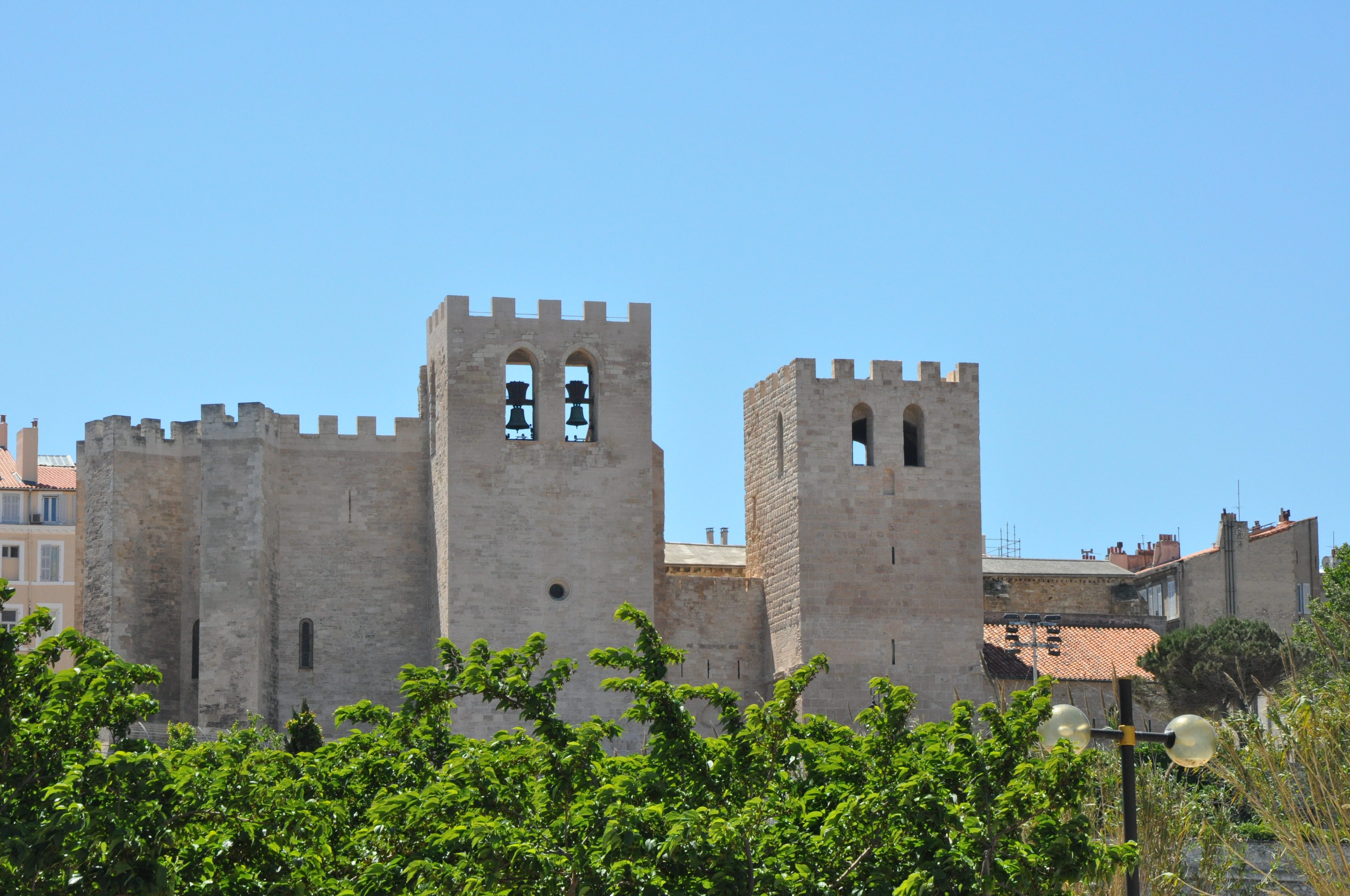 Marseille : l'abbaye Saint-Victor, aux allures de fortifications